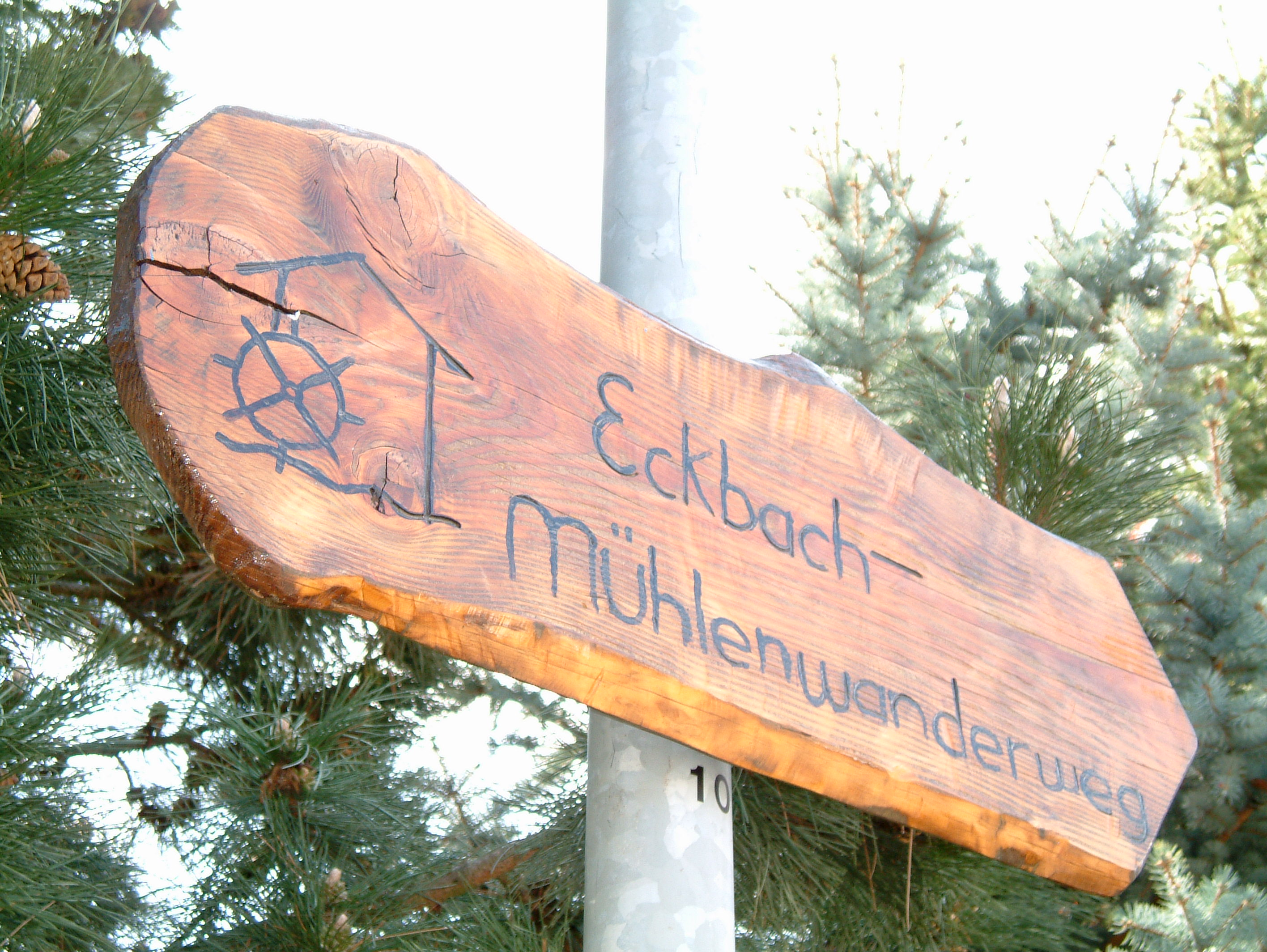 Markierungstafel am Eckbachmühlen-Rad- und Wanderweg zu Dirmstein, selbst fotografiert am 02.05.2006 und freigegeben durch Benutzer:Mundartpoet